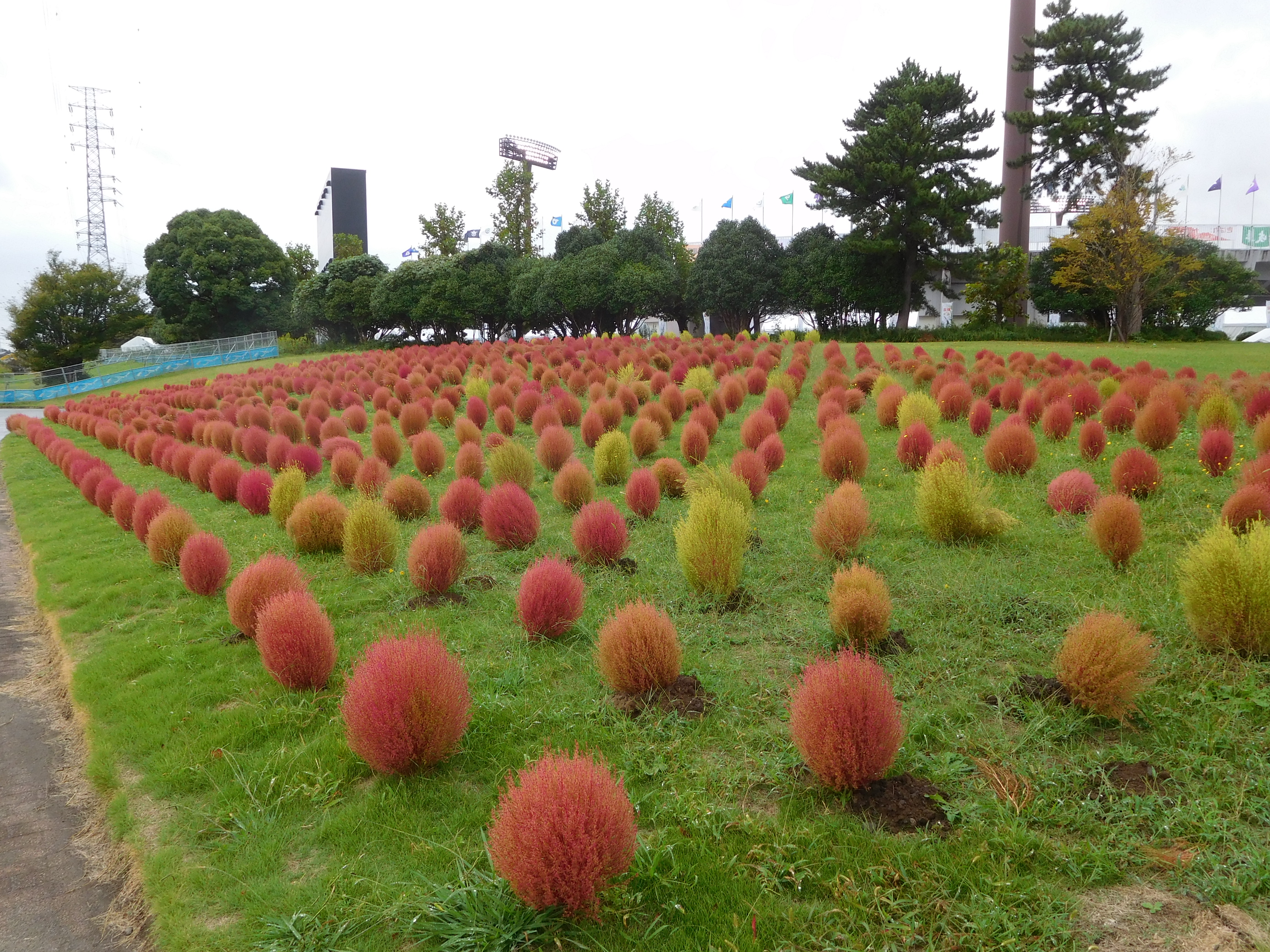 茨城県那珂市向山にある、笠松運動公園のコキア（ホウキギ）。